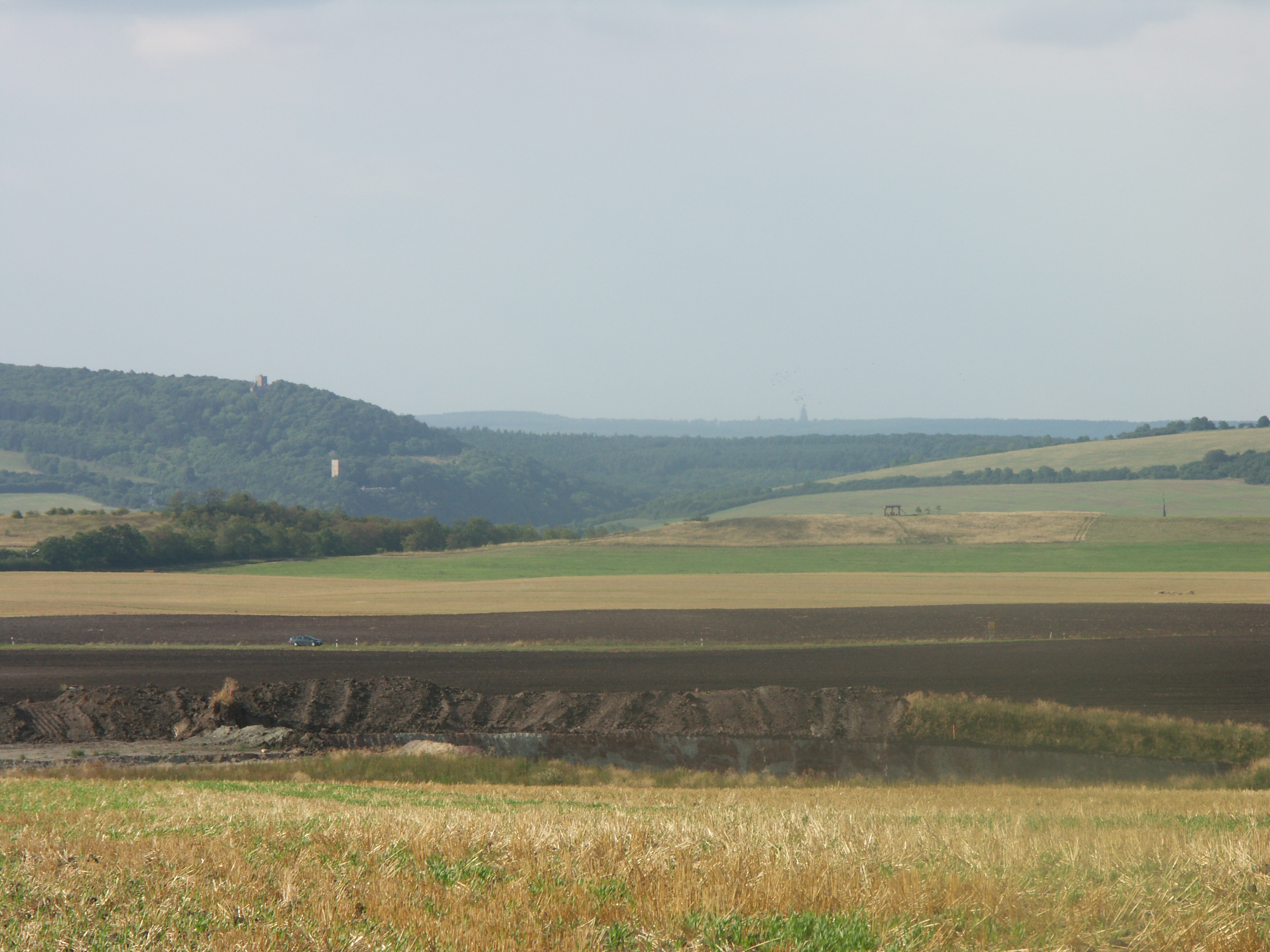 Thüringer Pforte (auch: Sachsenburger Pforte) in Thüringen, Deutschland von Süden im Hintergrund ist das Kyffhäuserdenkmal zu erkennen, der bewaldete Höhenzug mit den 2 Burgruinen von Sachsenburg auf der linken Seite ist das östliche Ende der Hainleite, gegenüber auf der rechten Seite beginnt die Schmücke